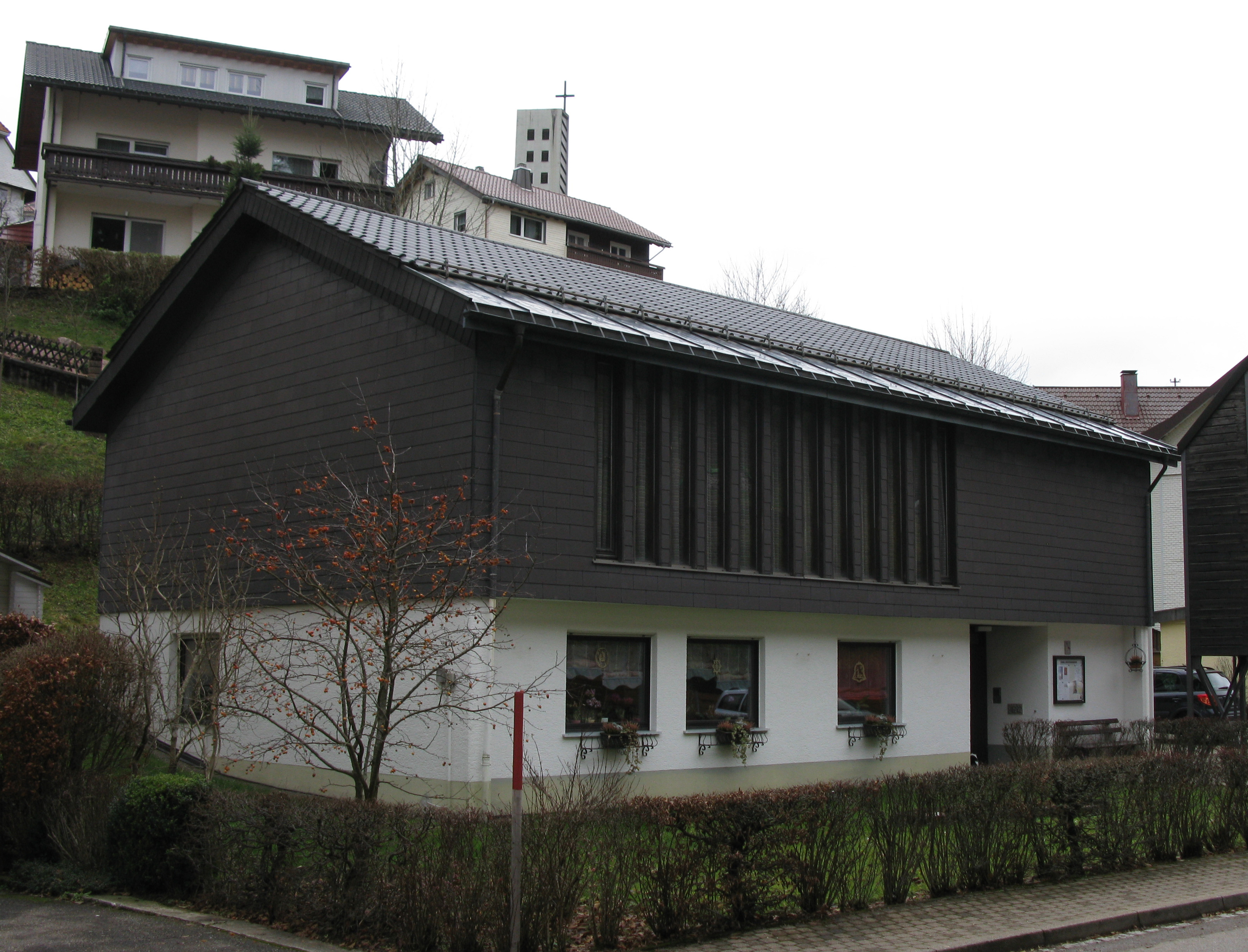 Evangelische Kirche in Gütenbach, im Hintergrund der Turm der kath. Kirche St. Katharina